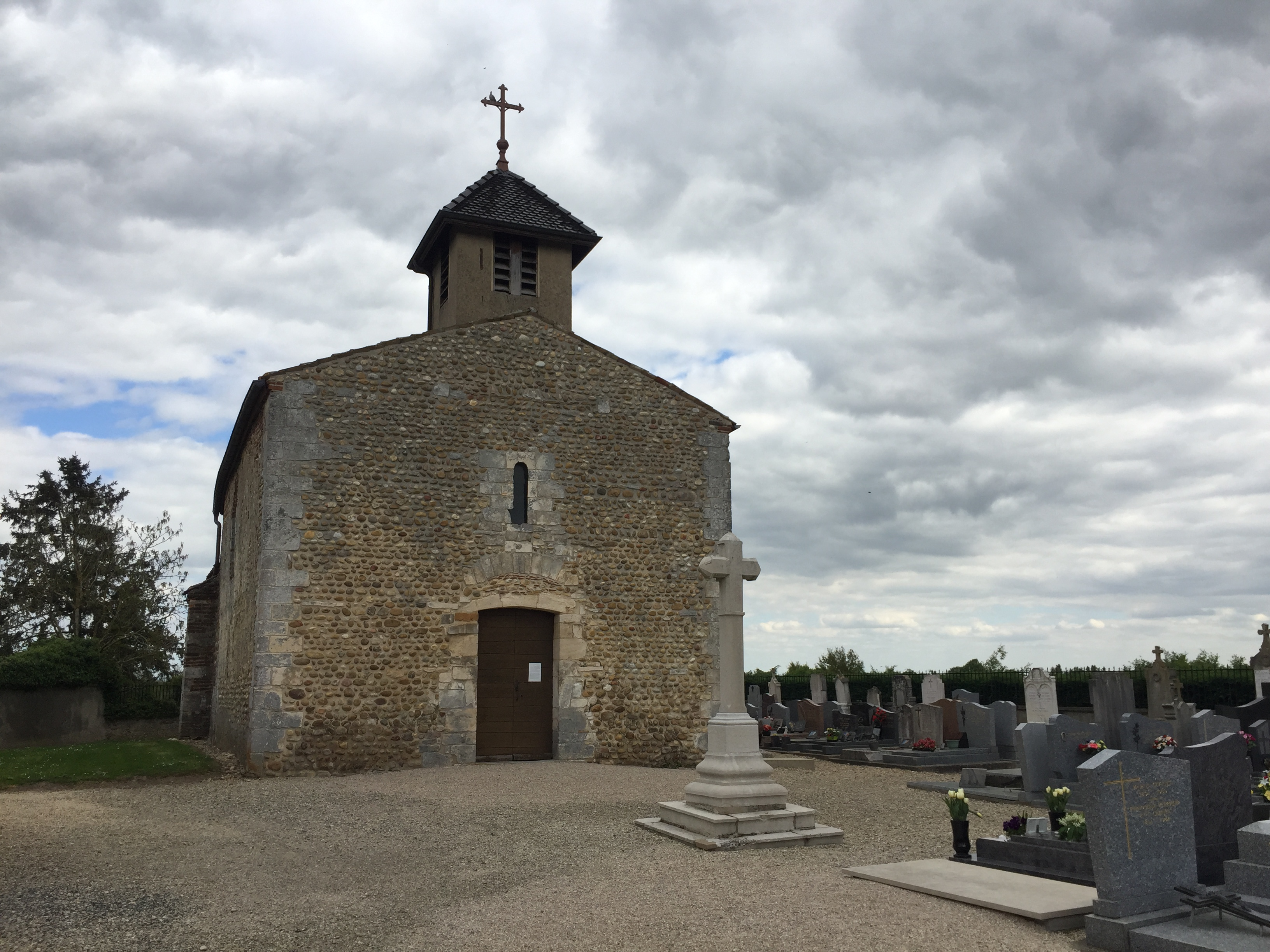 Image du village de Sainte-Olive, dans l'Ain, en France.